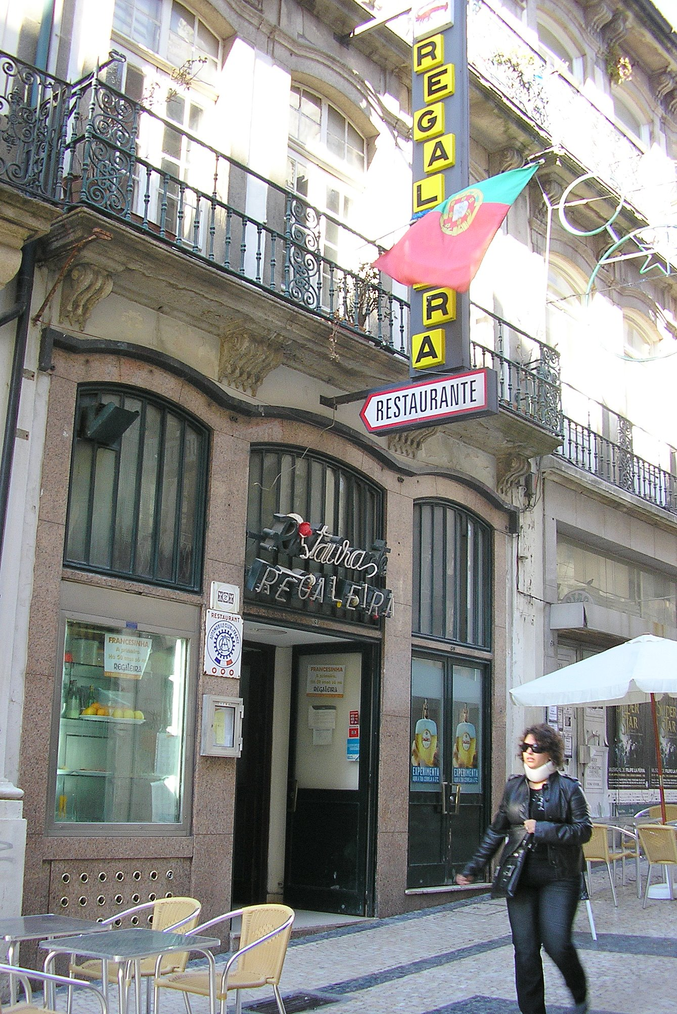 "A Regaleira" restaurant in Porto, Portugal